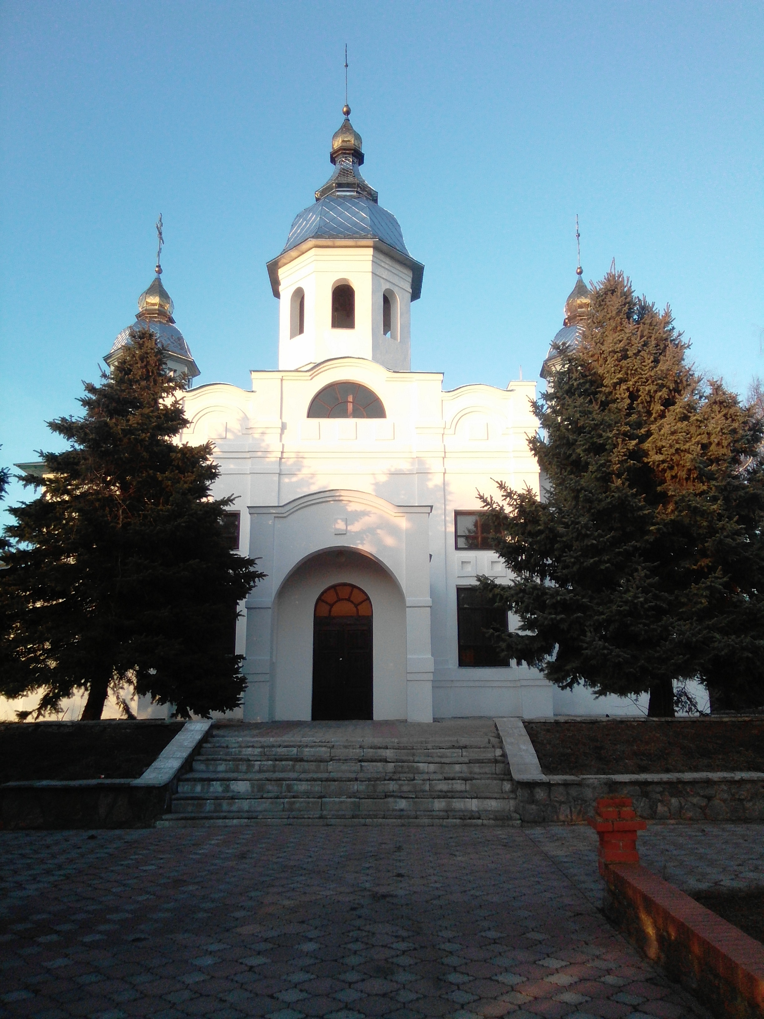 Храм Київського патріархату